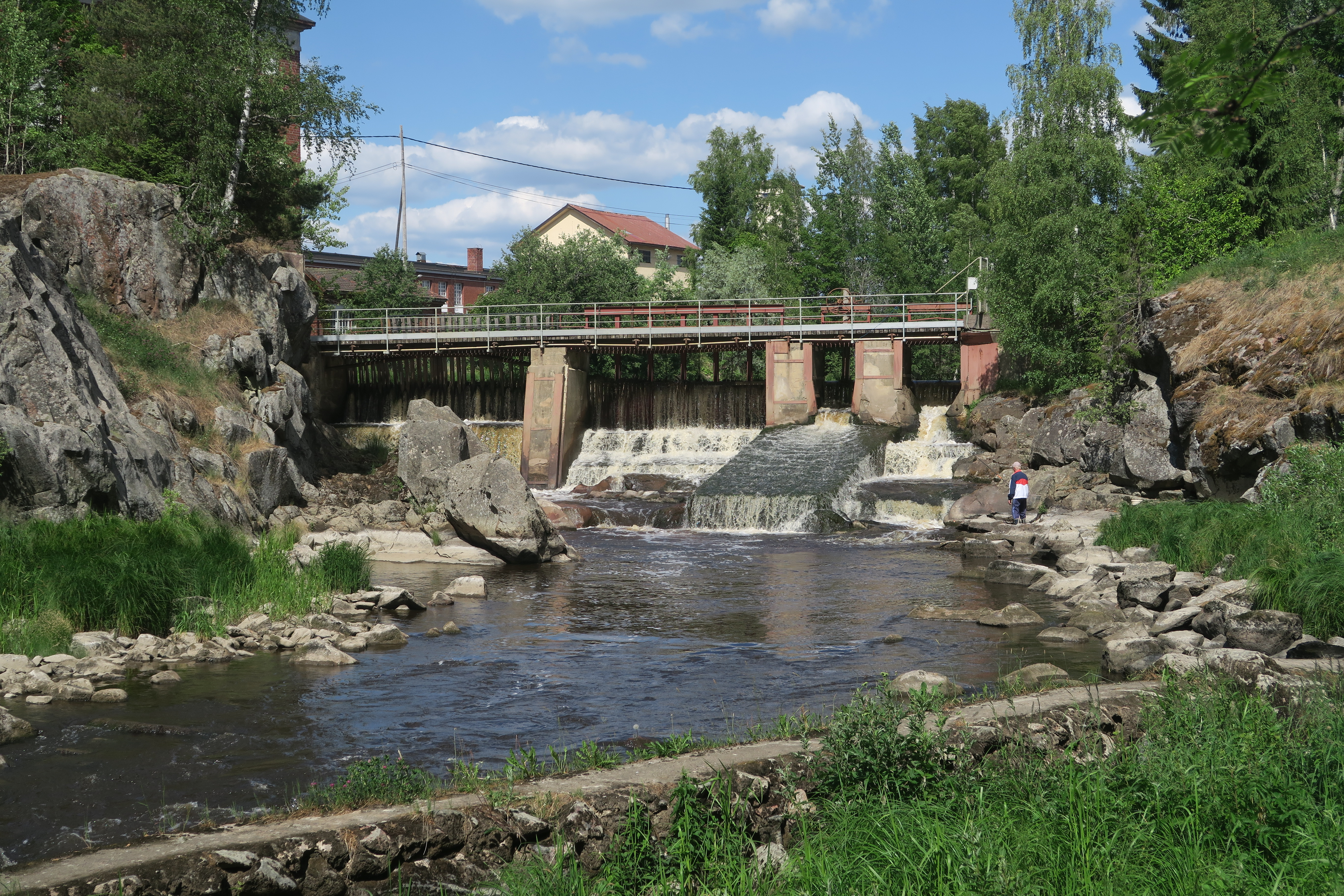 Hirvikoski Loimijoessa kesäkuussa 2018 nähtynä Hirvikosken kalastusalueelta.